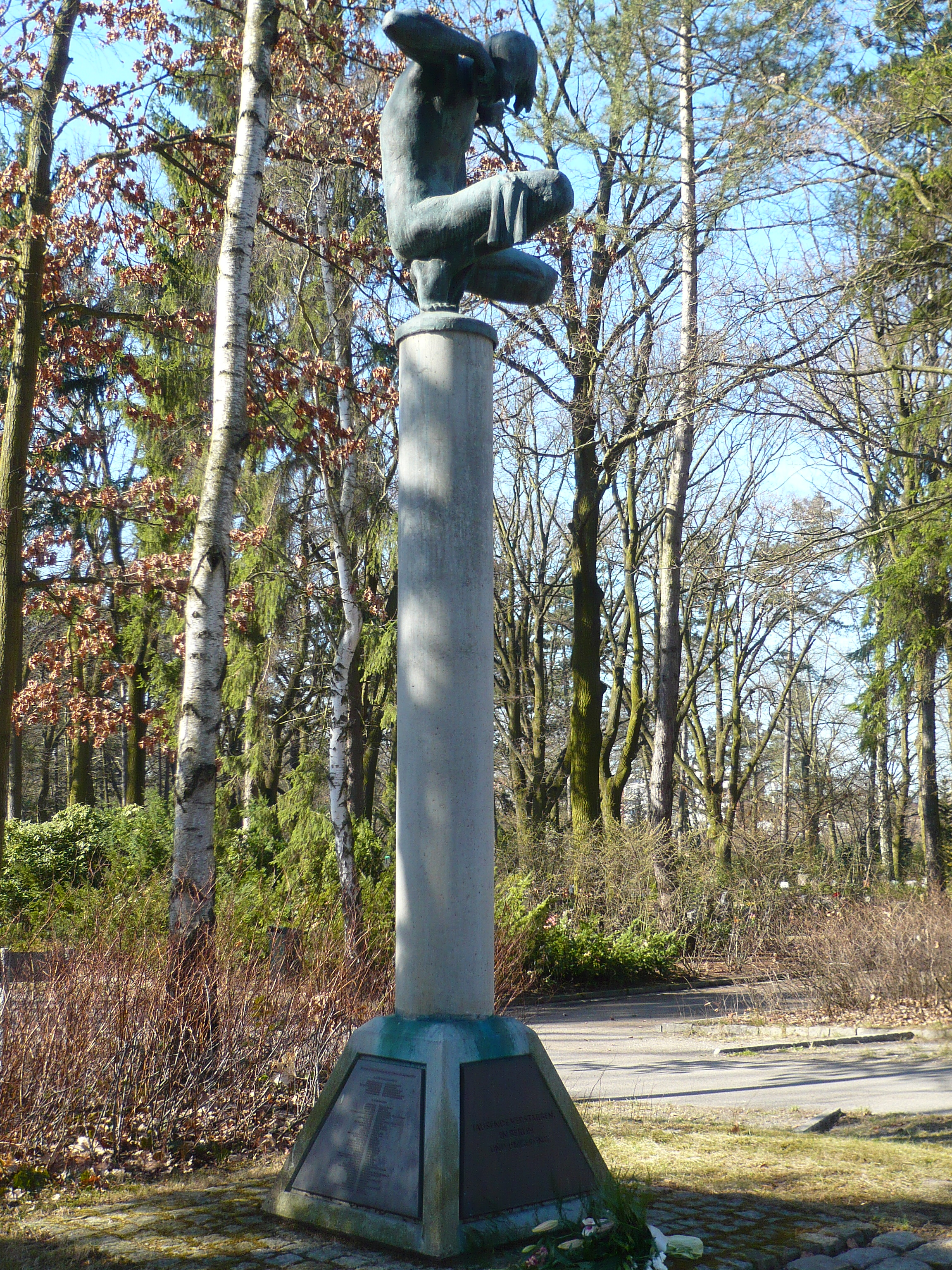 Ortsteil Marzahn: Parkfriedhof Wiesenburger Weg, Gräberfeld und Gedenkstele für die verstorbenen Zwangsarbeiter